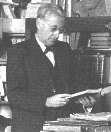 Luigi Medici (1888 - 1965) poeta italiano